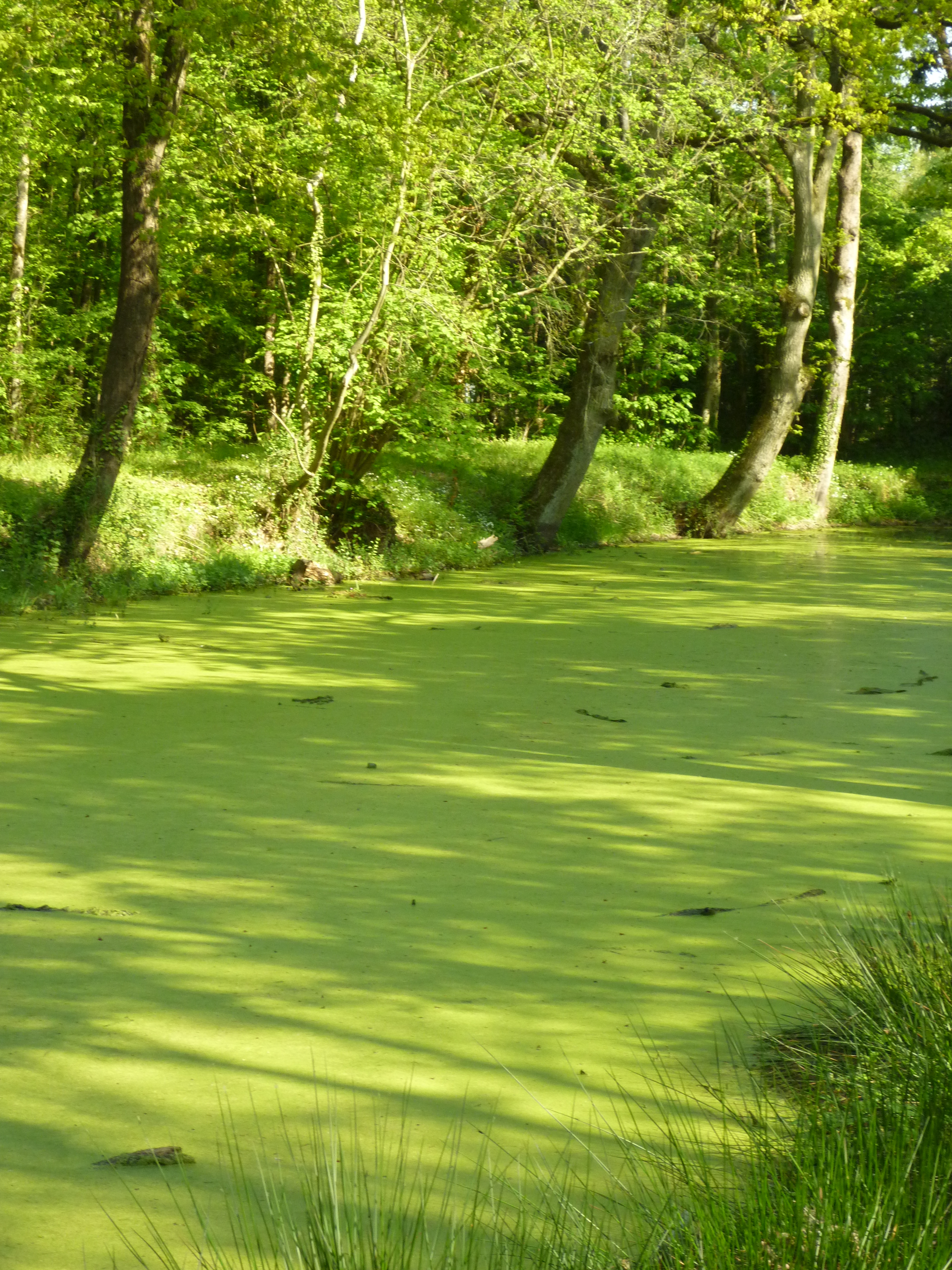 Zone naturelle de la Fassière à Saran